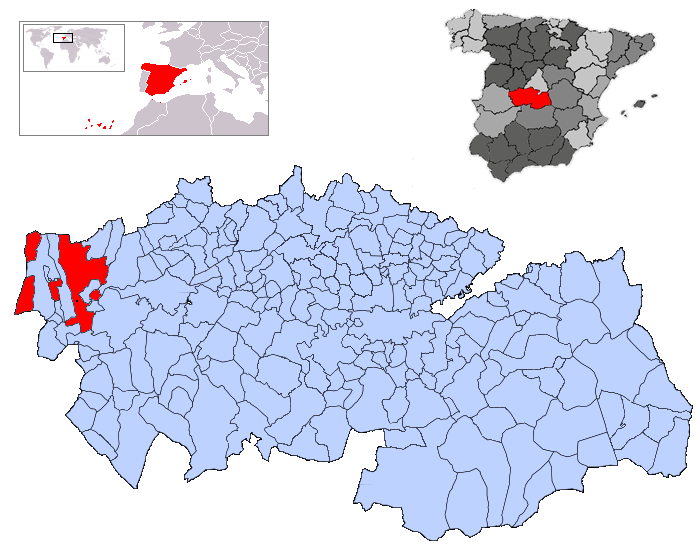 Oropesa en la provincia de Toledo